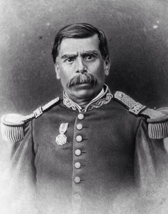 Presidente interino de Guatemala en 1882.